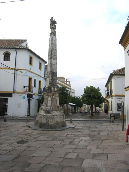 Triunfo de San Rafael en la plaza del Potro, Córdoba (España).